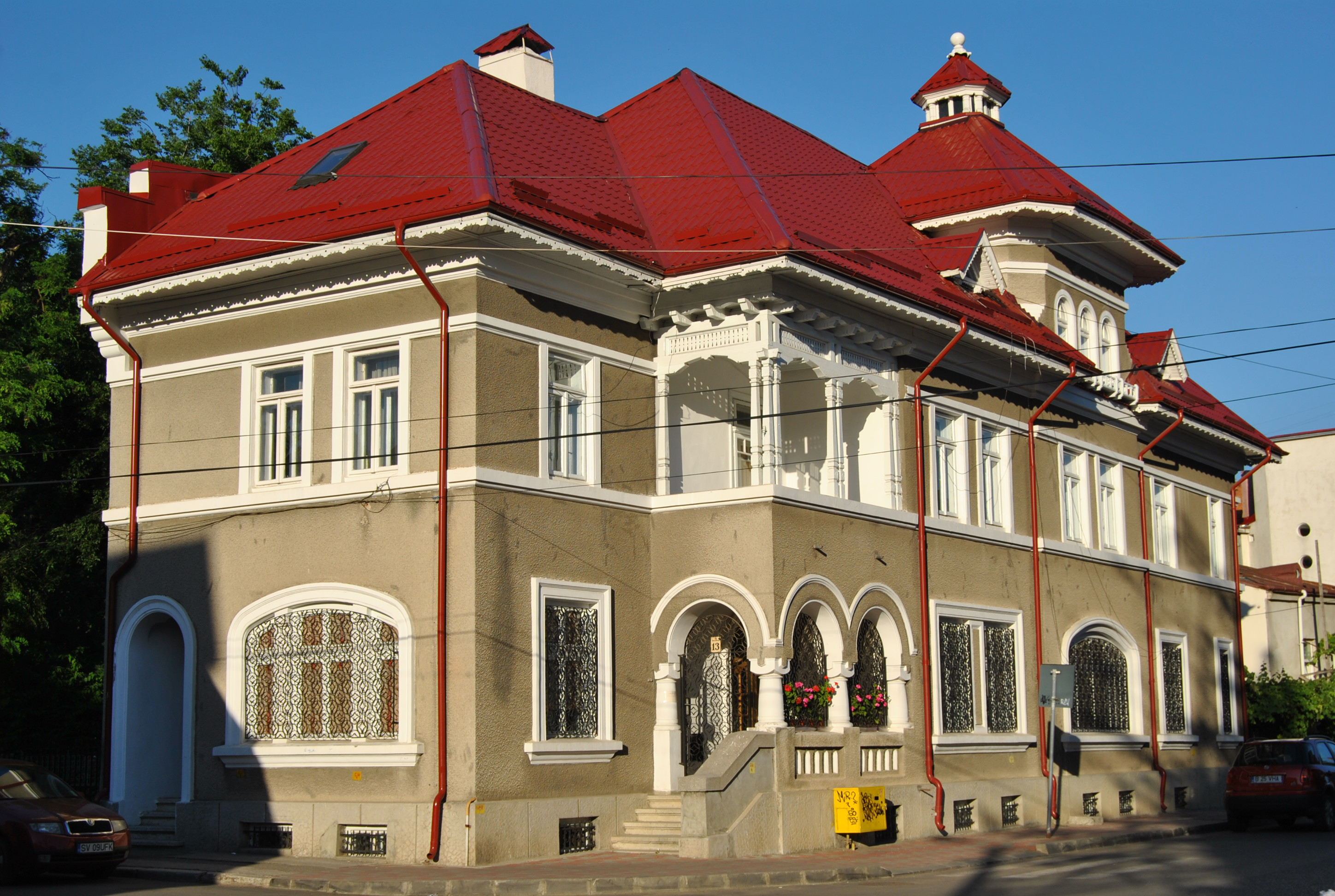 Casă, Str. Saulescu nr.13